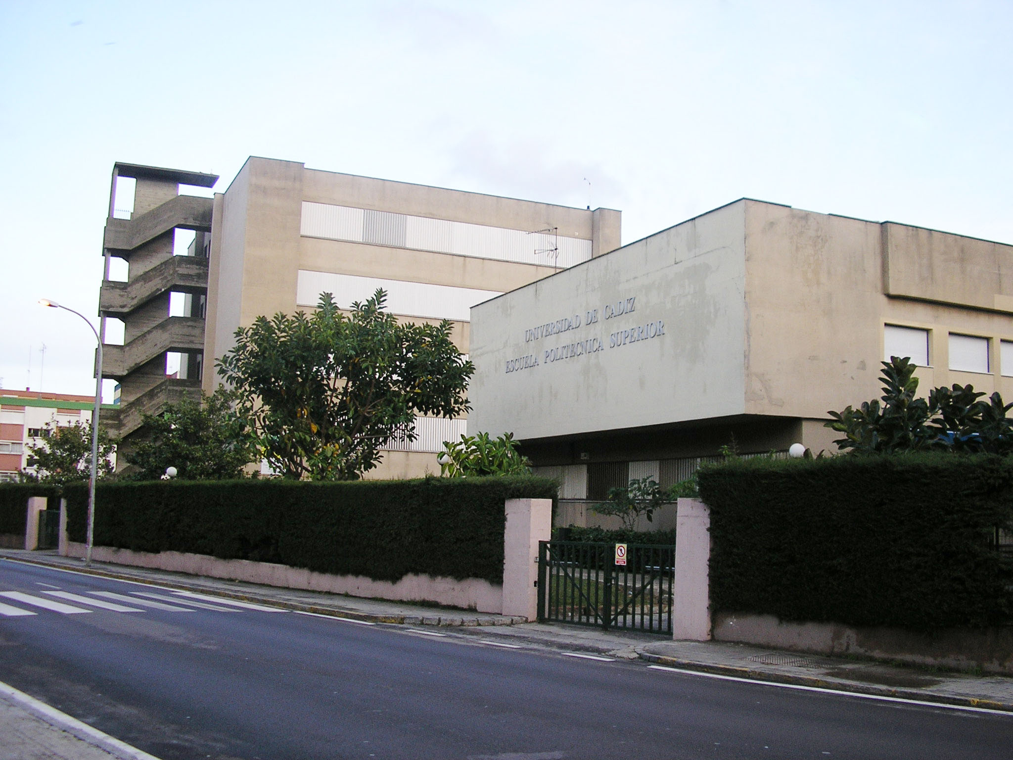 Escuela superior politécnica de Algeciras, Andalucía, España.